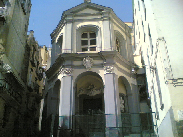 Facciata, Chiesa di Santa Giovanna d'Arco, Napoli